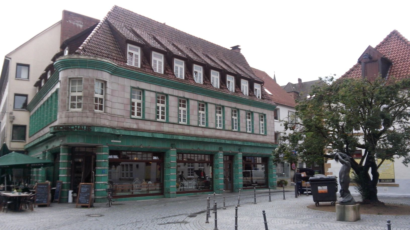 Kachelhaus (denkmalgeschützt) und Mirabellenplatz in Bielefeld.